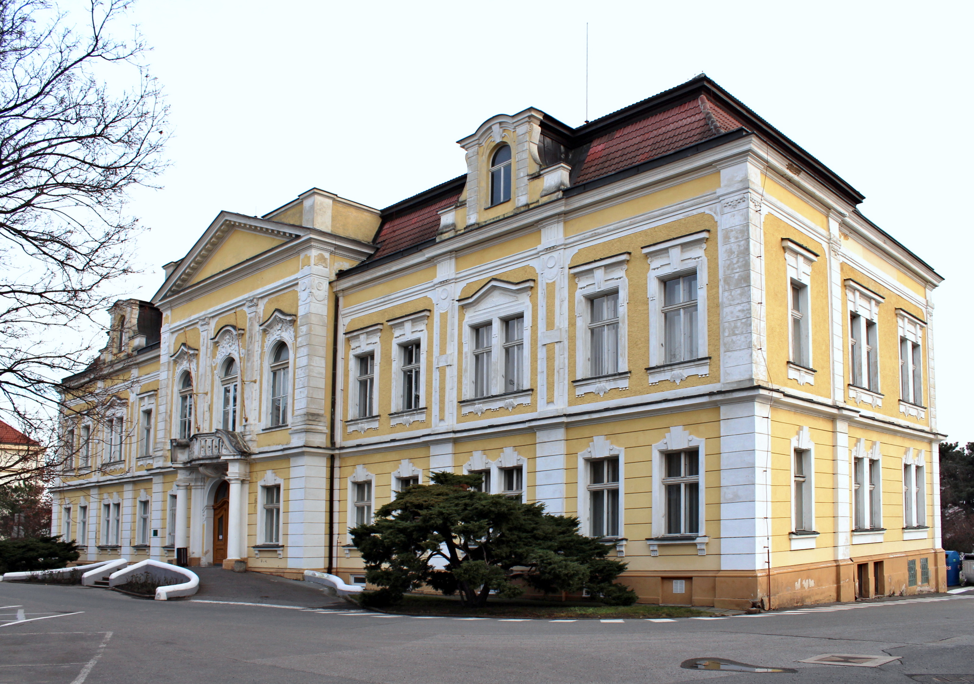 Fakultní nemocnice Královské Vinohrady